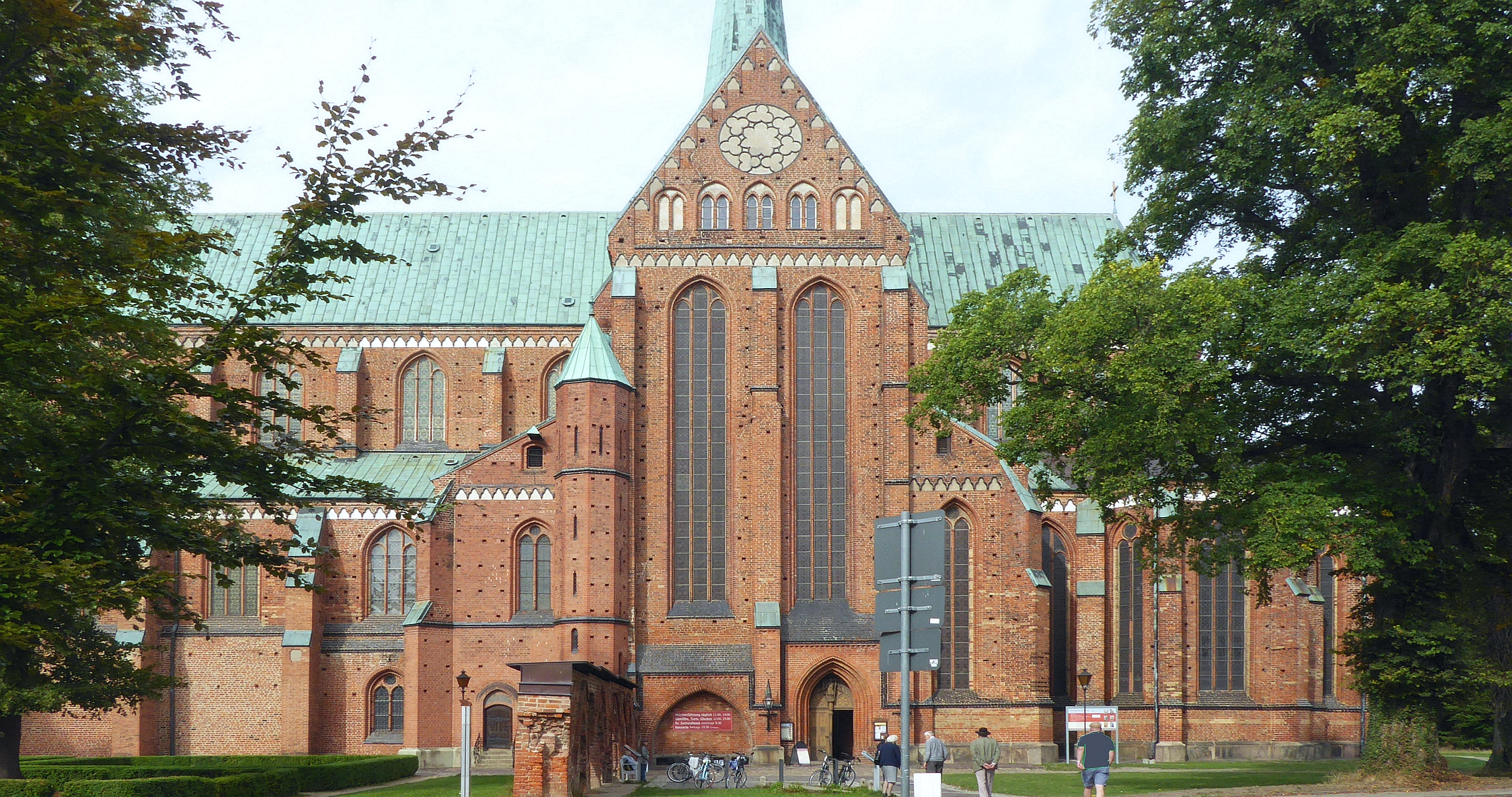 Westfassade vom Doberaner Münster in Norddeutscher Backsteingotik Mecklenburg-Vorpommrn - Foto Wolfgang Pehlemann P1260665